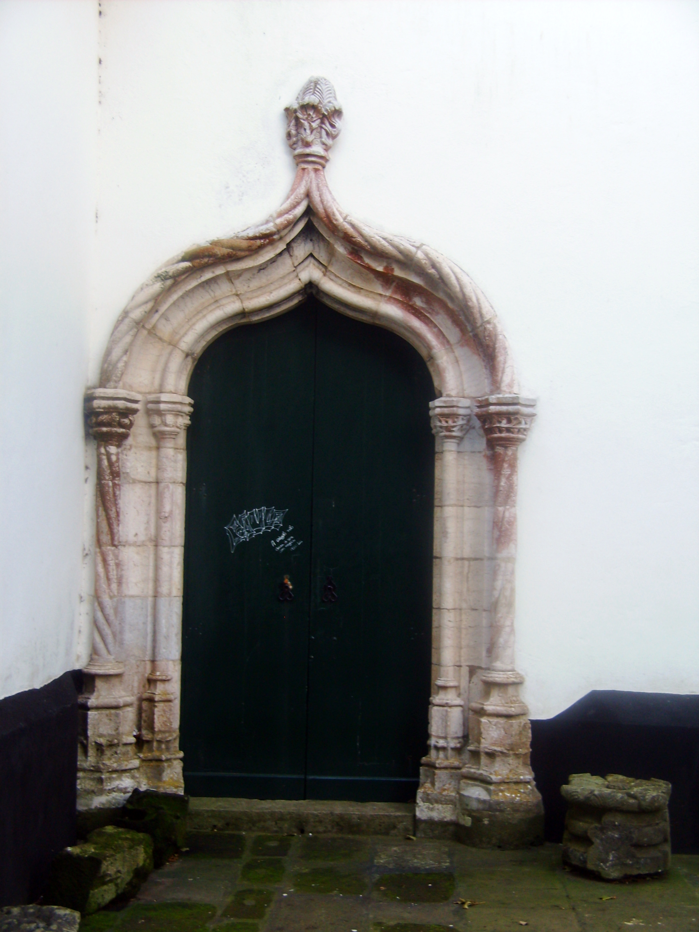 Igreja Matriz de Santa Cruz, Praia da Vitória, Ilha Terceira, Açores: portada lateral esquerda.